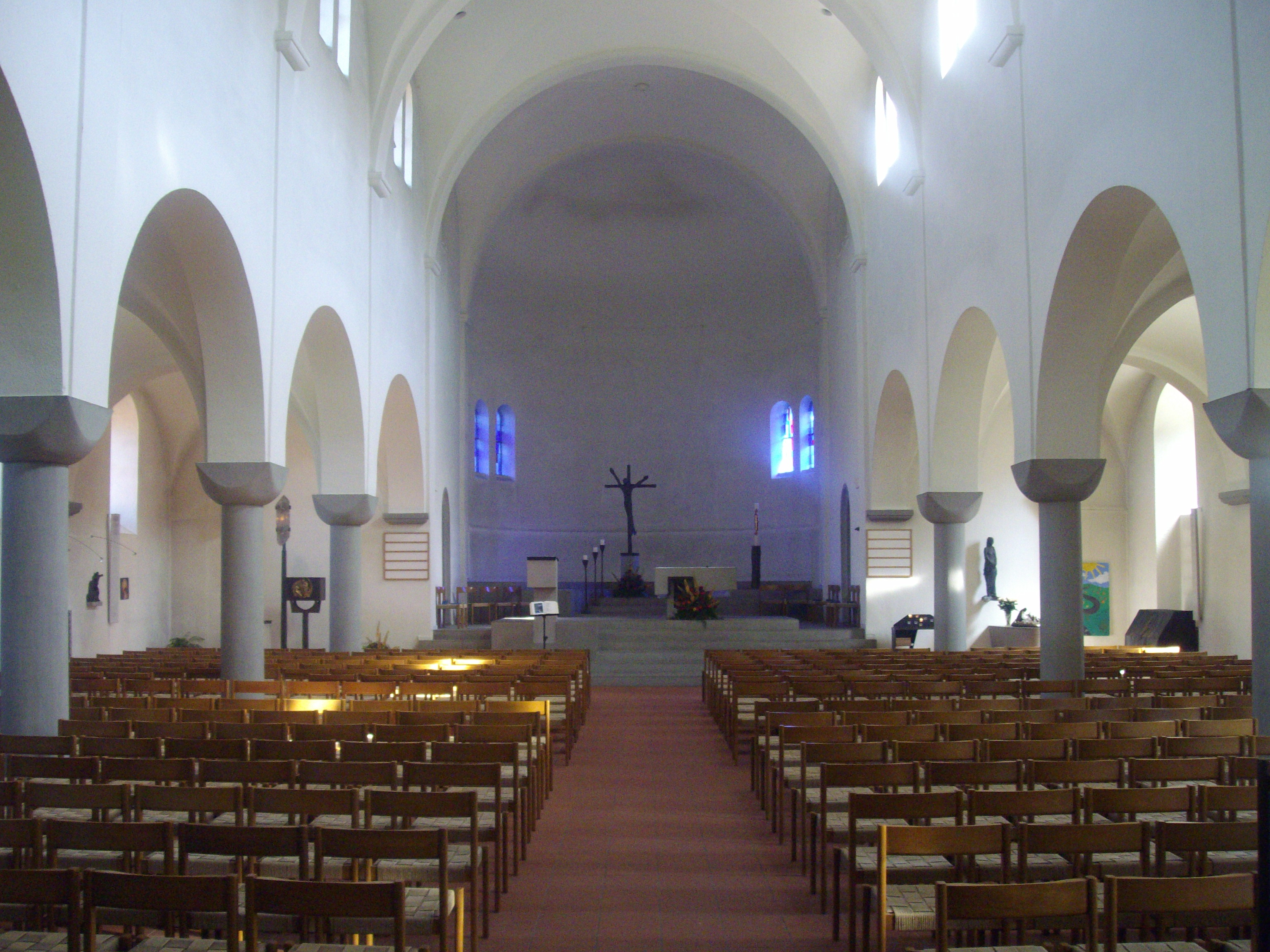 Innenraum der katholischen Pfarrkirche St. Marien, Wädenswil